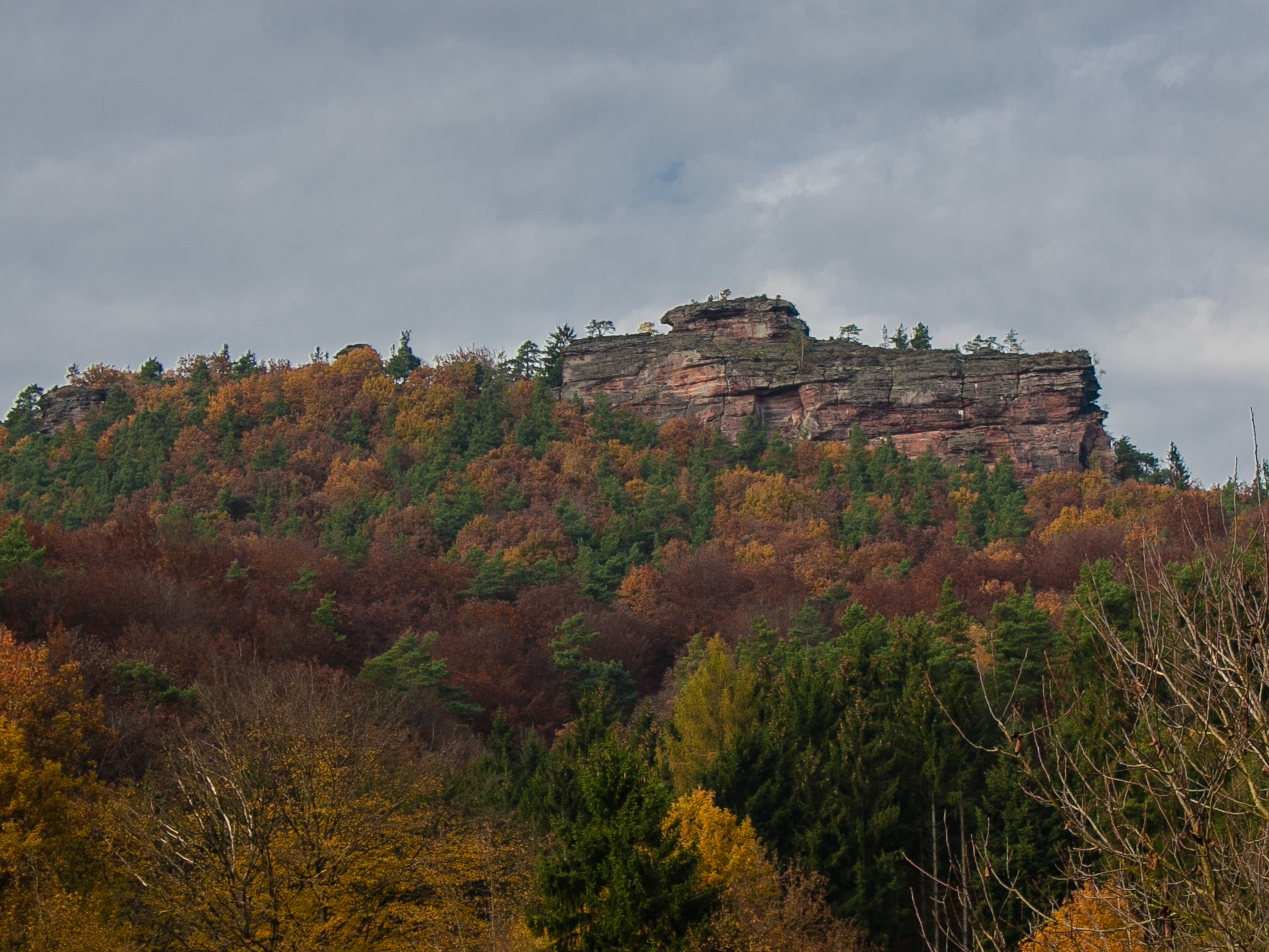 Rödelstein 428m - nördlich von Vorderweidenthal